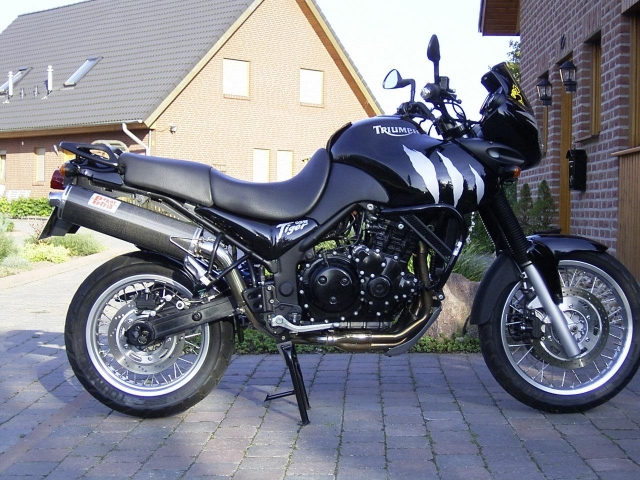 Triumph 955 Tiger modèle 2001